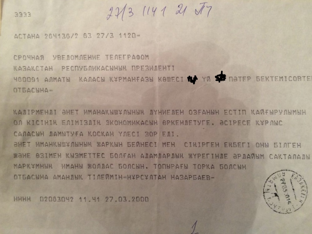 Телеграмма